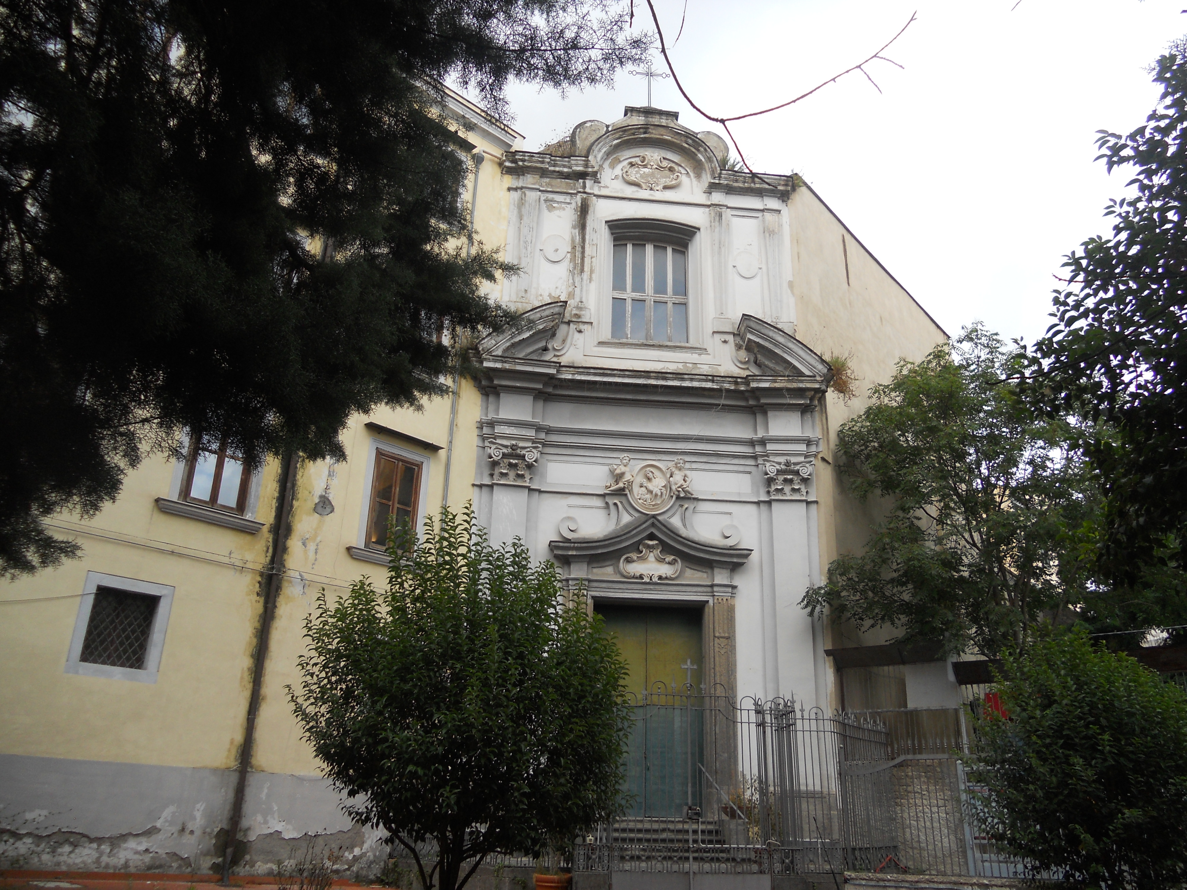 Facciata, Santa Maria delle Grazie, Napoli